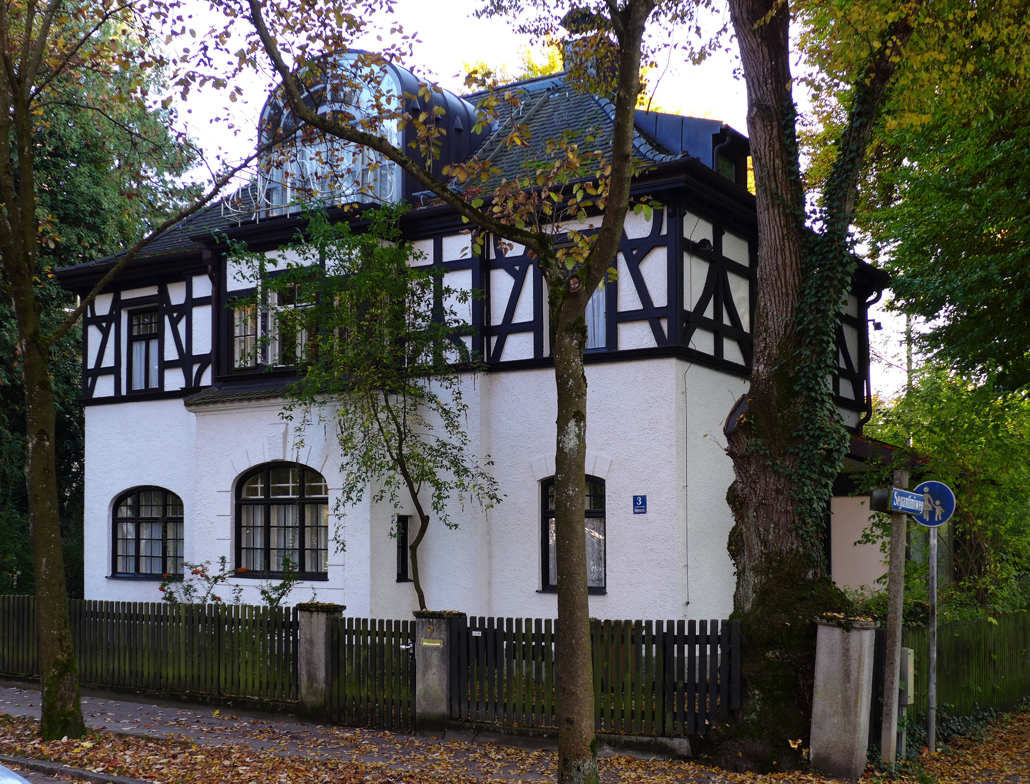 Rubensstr 3, München